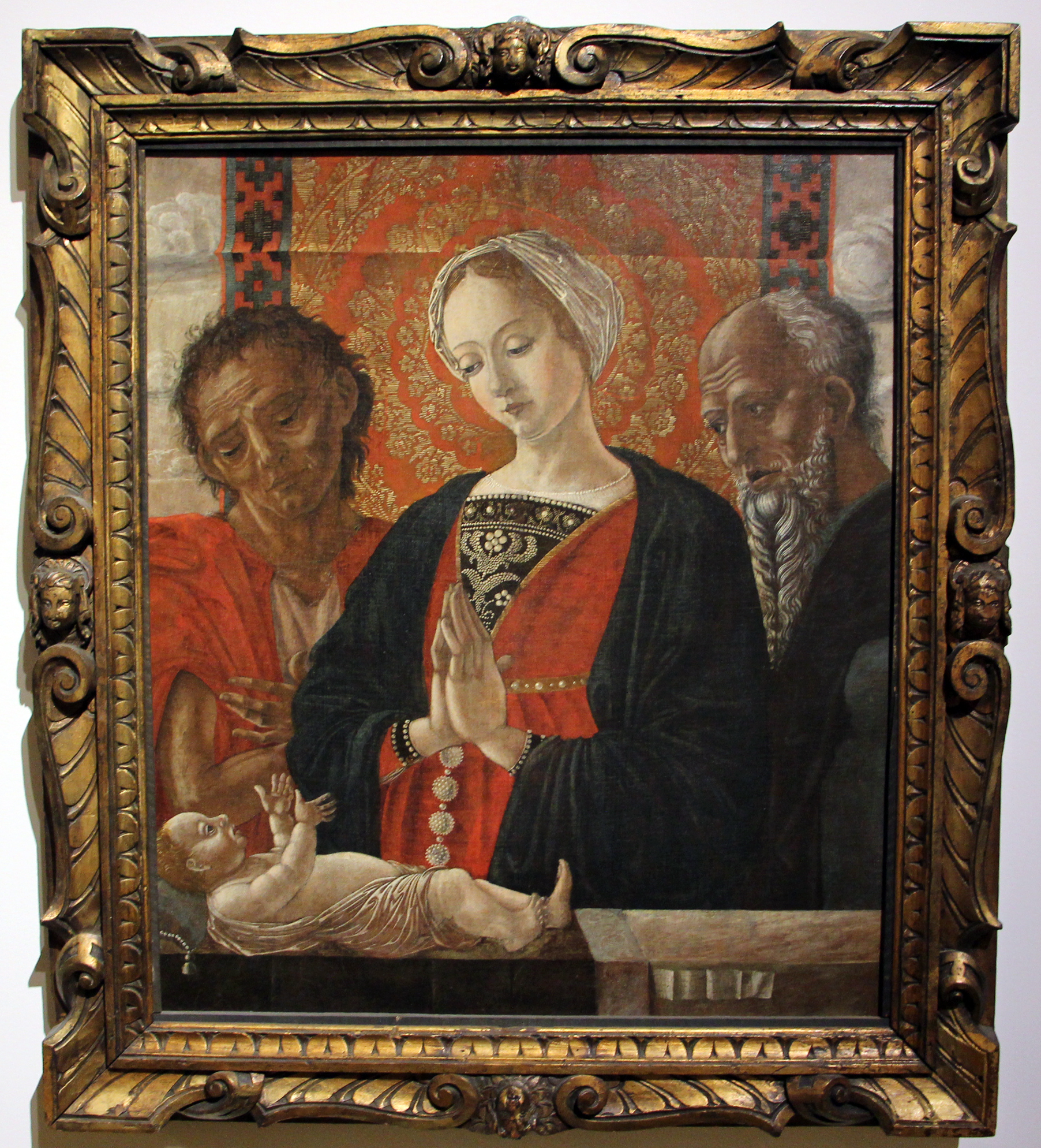 Fondazione Cavallini Sgarbi